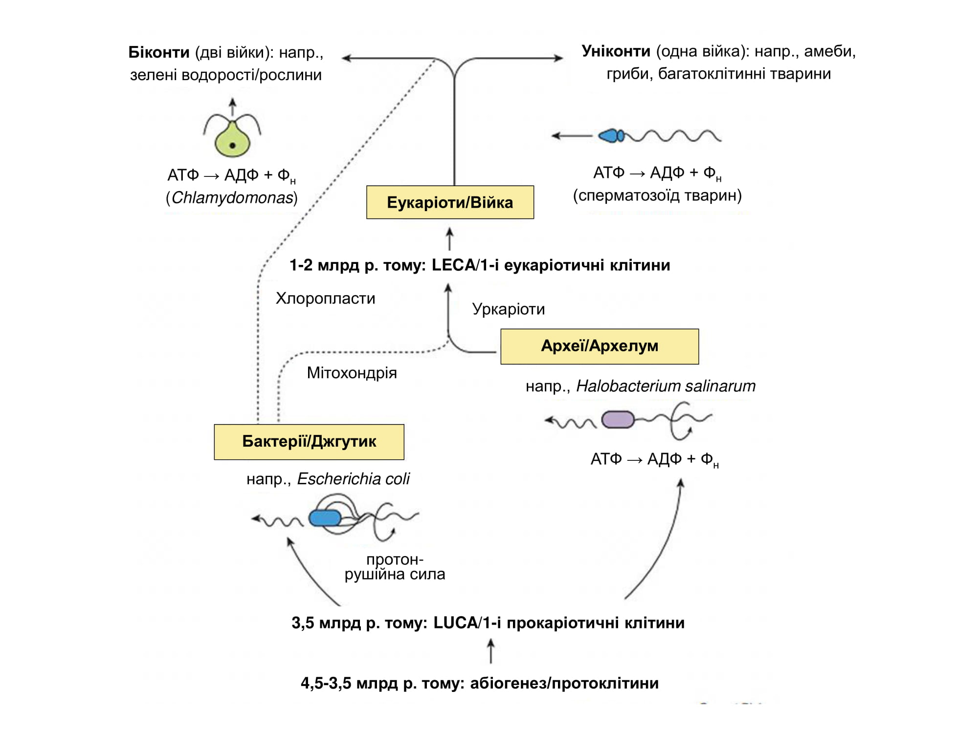 Вважається, що всі три домени життя еволюціонували від «останнього загального спільного предка» усіх клітин (LUCA) – популяції клітин, які передавали генетичну інформацію з ДНК через РНК на білок. Після утворення Землі 4,5 млрд років тому і періоду пребіотичної хімії, що призвів до утворення та еволюції протоклітин, приблизно 3,5 млрд років тому виник LUCA та пов'язані з ними прокаріотичні клітини, які згодом диверсифікувались на бактерії, що використовують для плавання джгутики, та архей із органелою руху – архелумом. Близько 1–2 млрд років тому виник останній спільний предок усіх еукаріотичних клітин (LECA), який утворився від археї в процесі формування мітохондрій із ендосимбіотичних бактерій (хлоропласти утворилися пізніше з ціанобактеріальних ендосимбіонтів). LECA, скоріше за все, містив складний цитоскелет, включаючи апарат, необхідний для мітозу і мейозу, клітинної локомоції, а також «типові» війки 9+2. Біфуркація LECA породила два широкі класи організмів, що різняться за кількістю війок, а саме: уніконтів (амебоїдні протисти, гриби та багатоклітинні тварини, які мають одну війку) та біконтів (евгленіди, форамініфери, динофлагеляти, наземні рослини та зелені водорості, які зазвичай використовують дві війки)